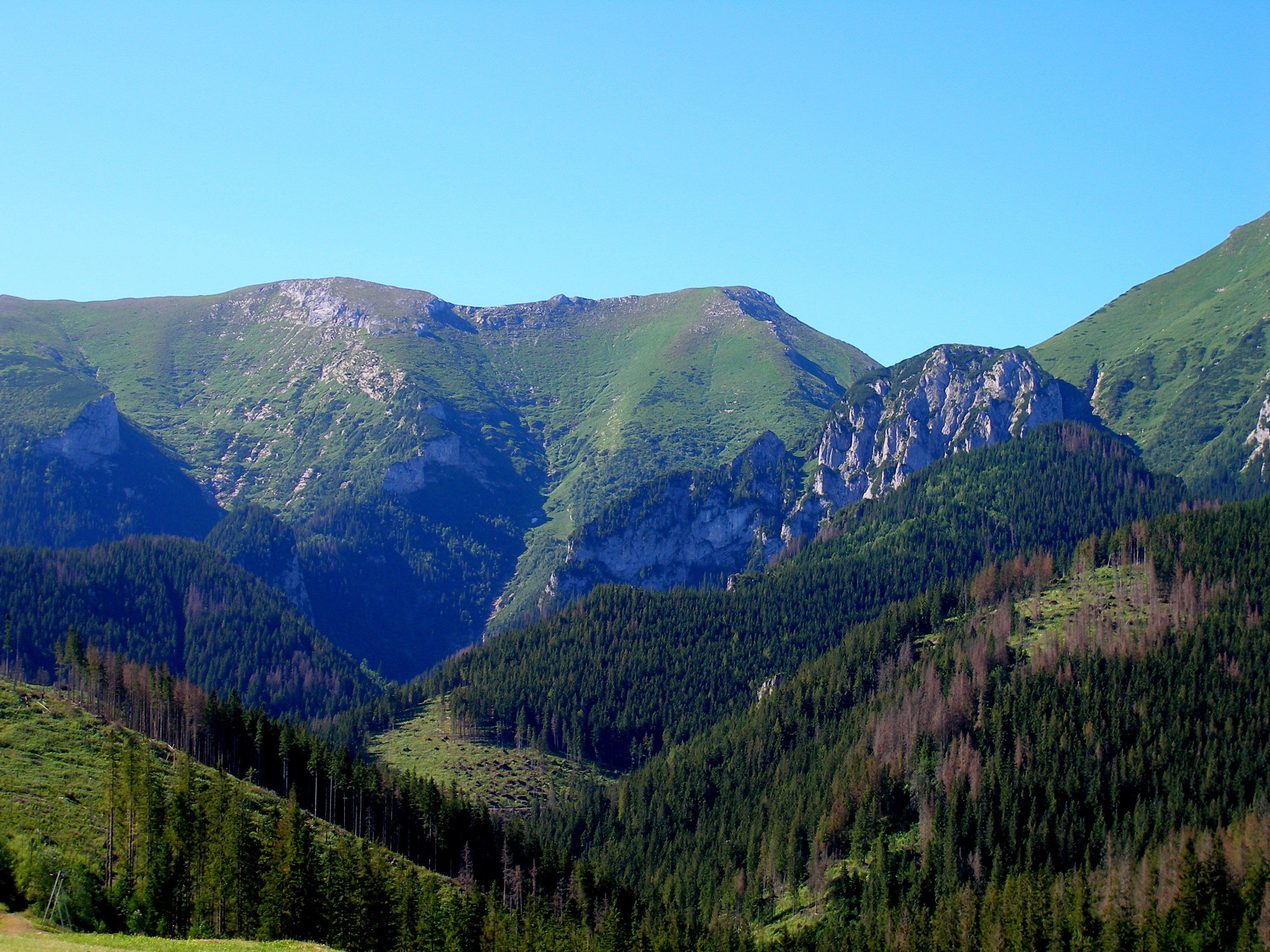 Belianske Tatry pri obci Ždiar.